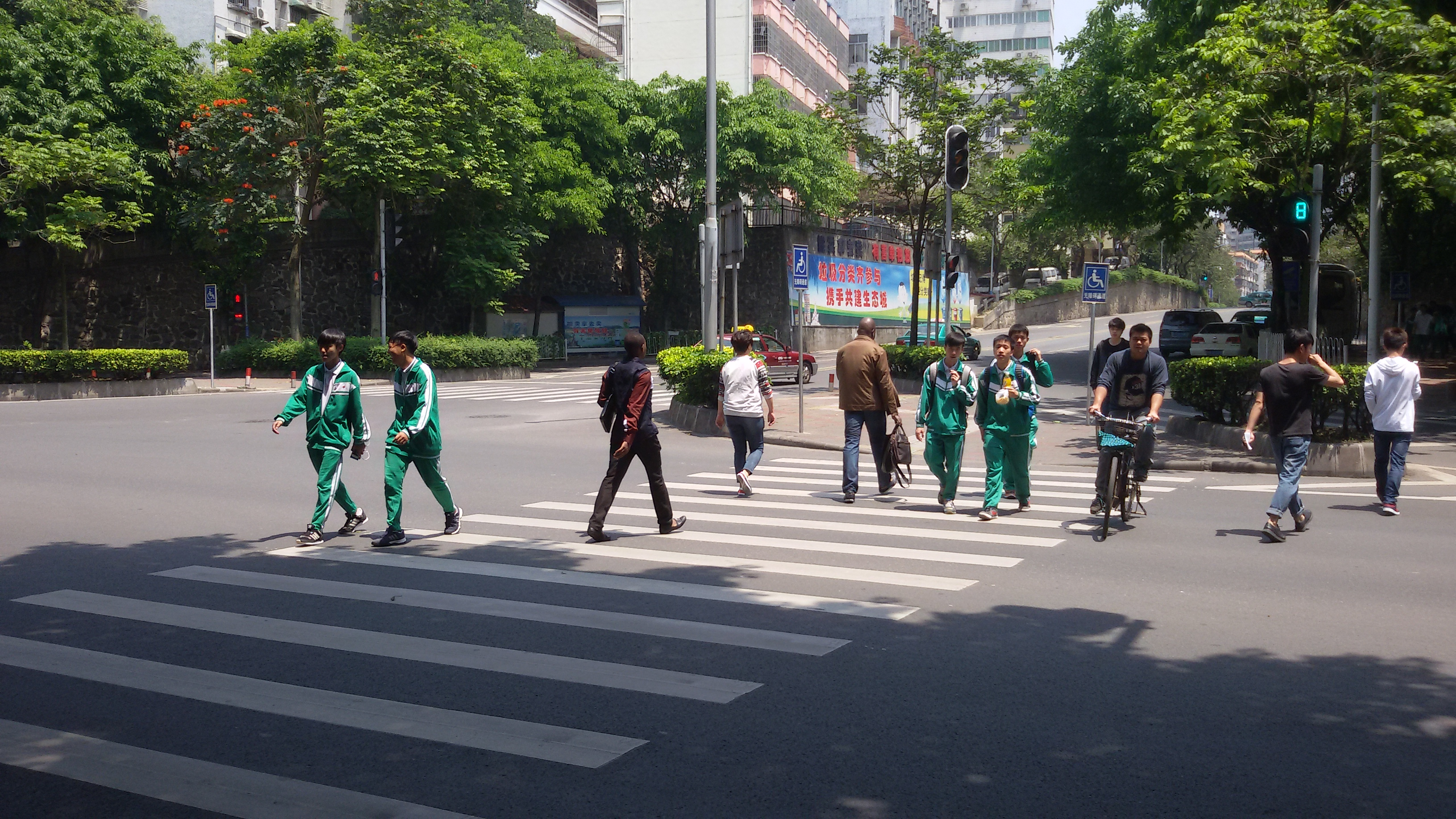 粵語: 麓景西路最西邊，下塘西路口嗰頭嘅交通光附近。